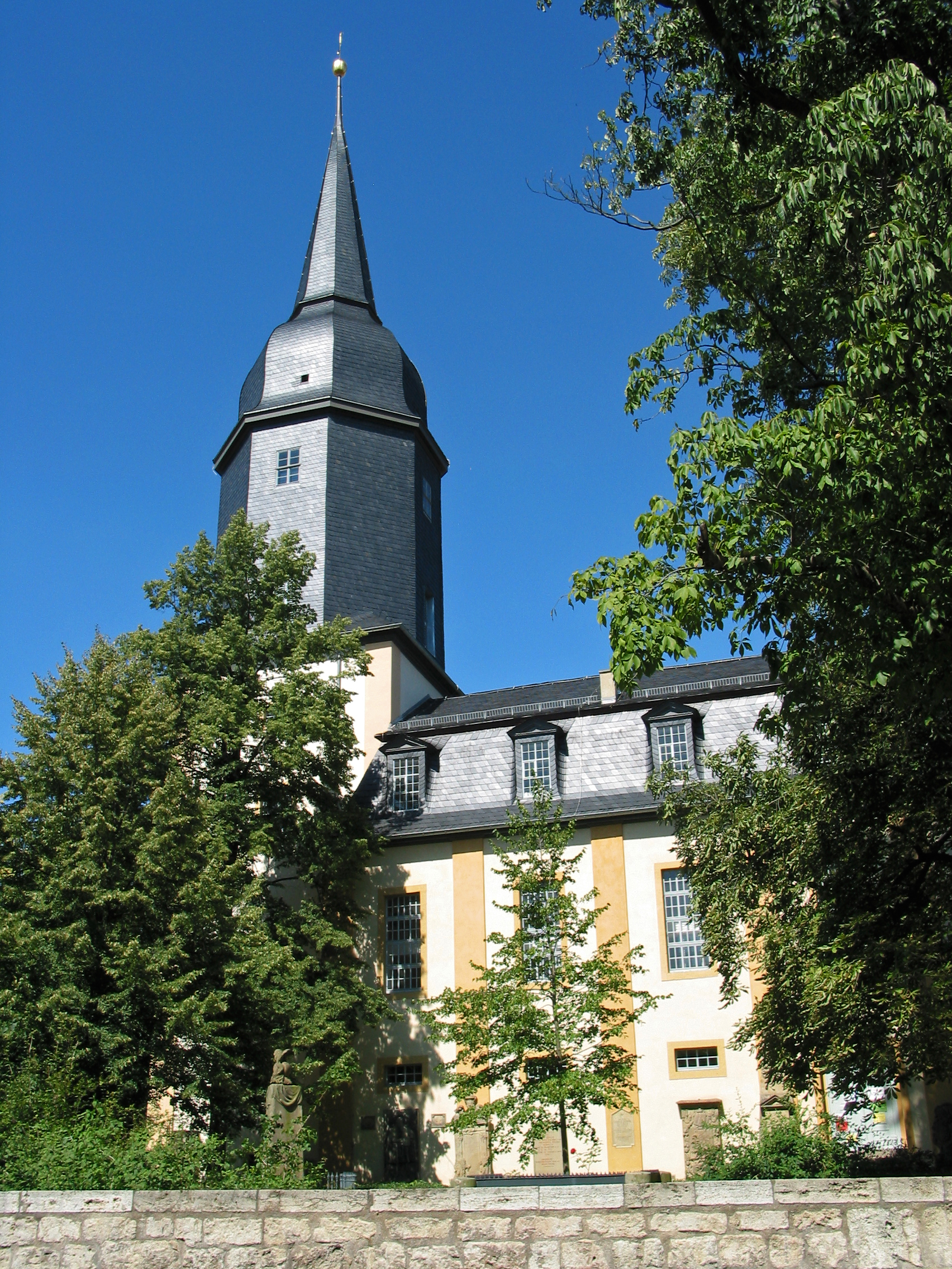 Südansicht der Jakobskirche in Weimar (Blick aus der Kleinen Kirchgasse).